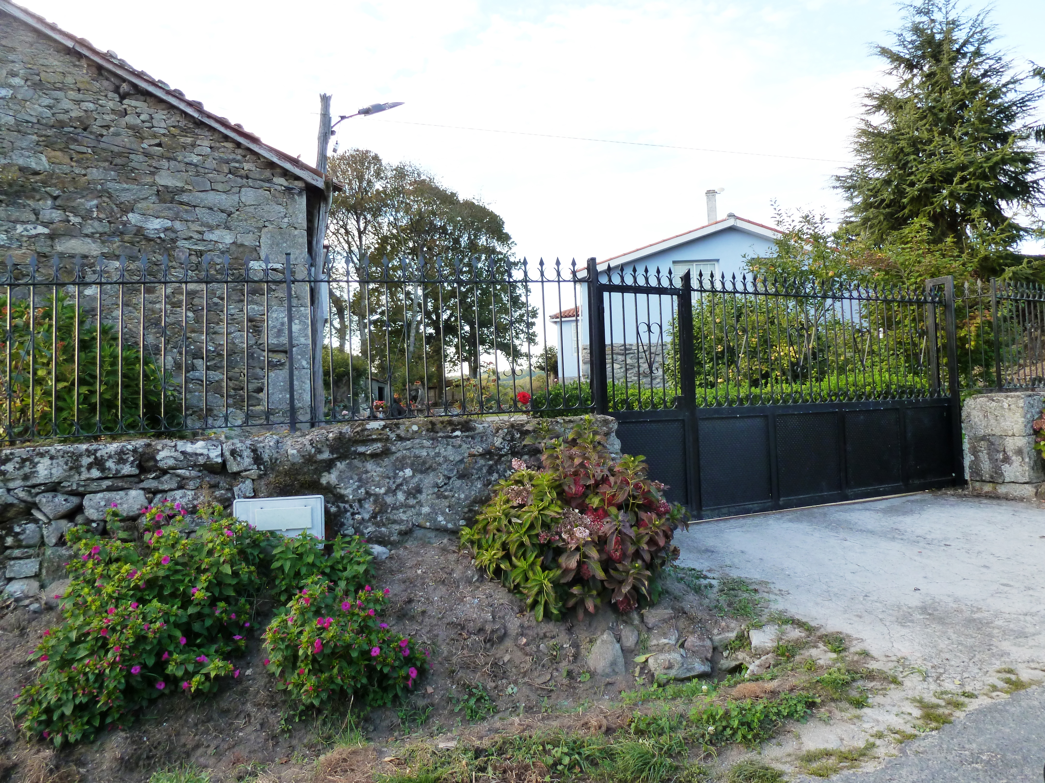 Alén do Río, Buciños, Carballedo